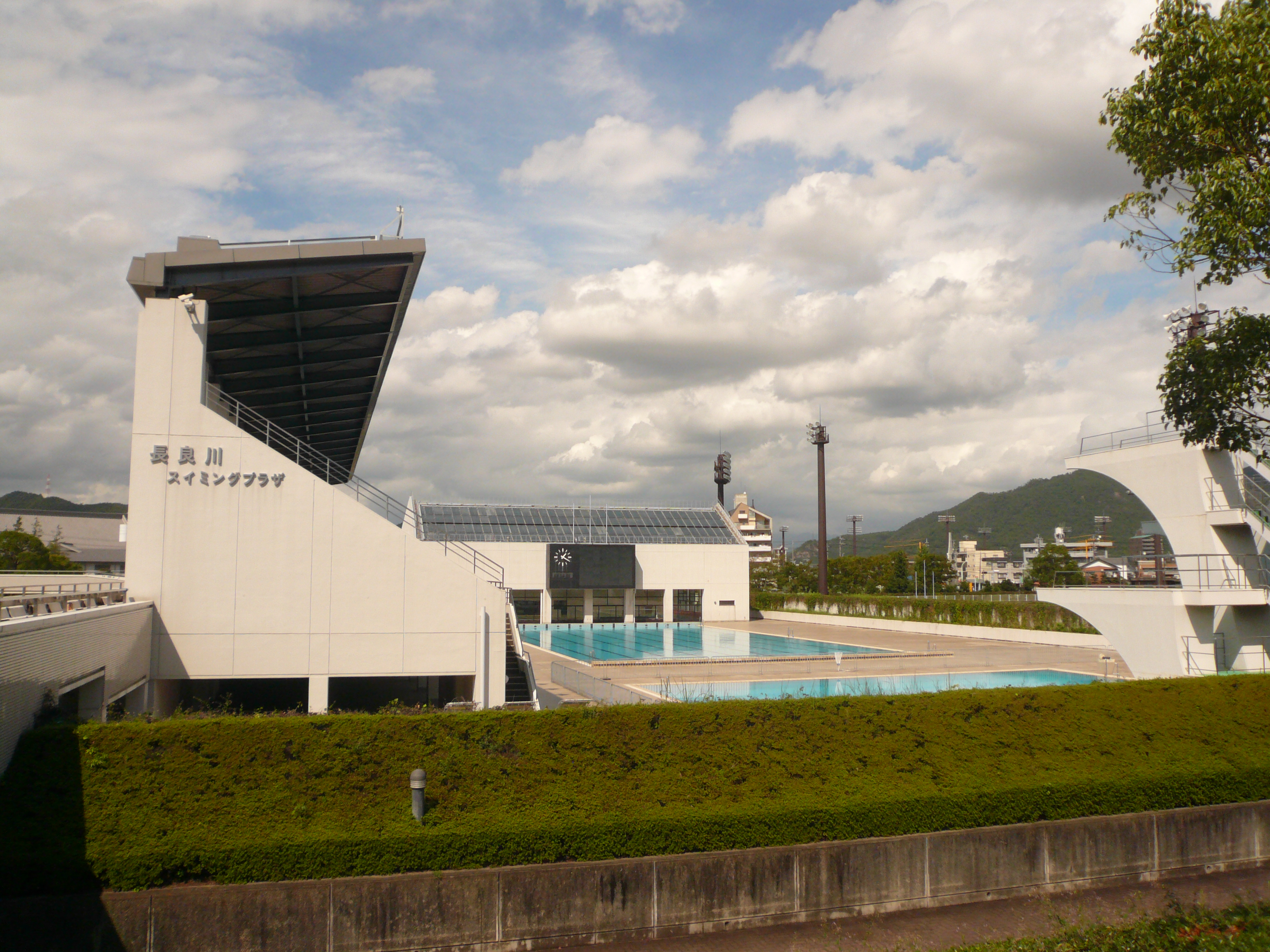 Gifu Memorial Center Nagaragawa Swimming Plaza（岐阜メモリアルセンター）,Gifu,Gifu(岐阜県岐阜市)で撮影。長良川スイミングプラザ